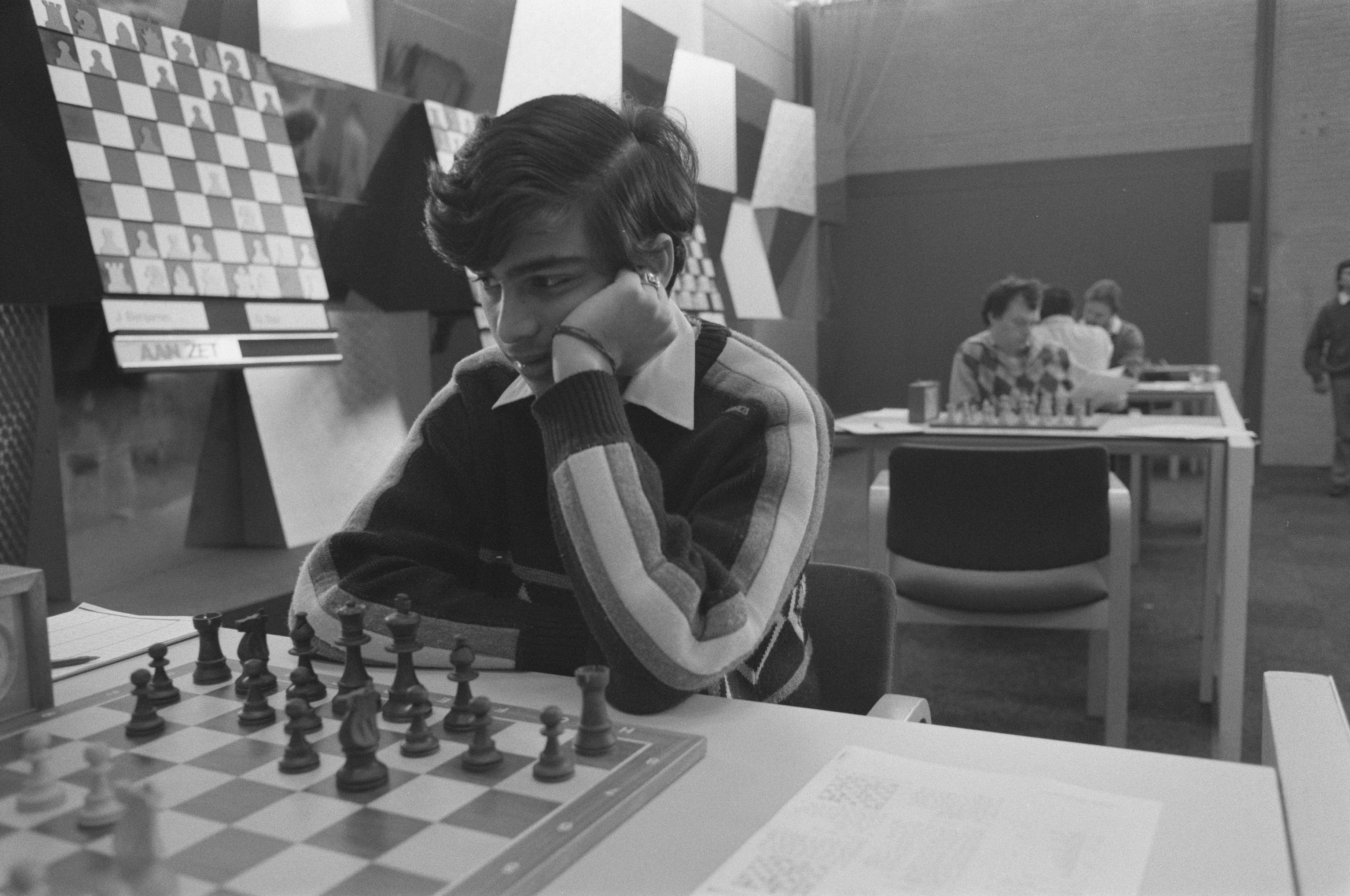 Collectie / Archief : Fotocollectie Anefo Reportage / Serie : [ onbekend ] Beschrijving : De laatste ronde van het Hoogoven-schaaktoernooi, medewinnaar Anand (India) in actie Datum : 29 januari 1989 Trefwoorden : schakers, toernooien Persoonsnaam : Amand Fotograaf : Bogaerts, Rob / Anefo Auteursrechthebbende : Nationaal Archief Materiaalsoort : Negatief (zwart/wit) Nummer archiefinventaris : bekijk toegang 2.24.01.05 Bestanddeelnummer : 934-3963